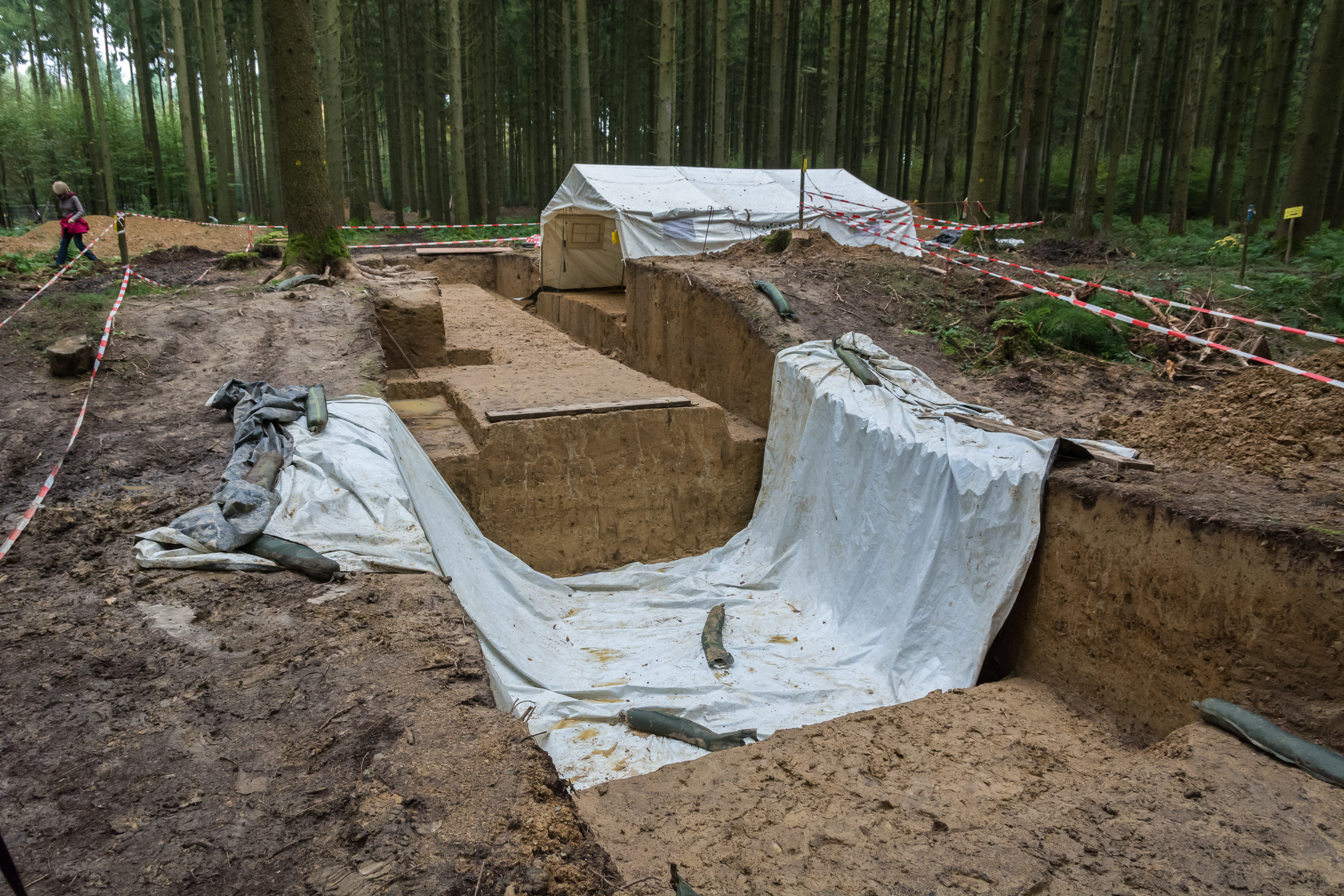 Grabung an der Viereckschanze östlich des Fürstengrabhügels Hohmichele, Wald Speckhau, nahe der Heuneburg bei Hundersingen. Schnitt durch Wall und Graben.